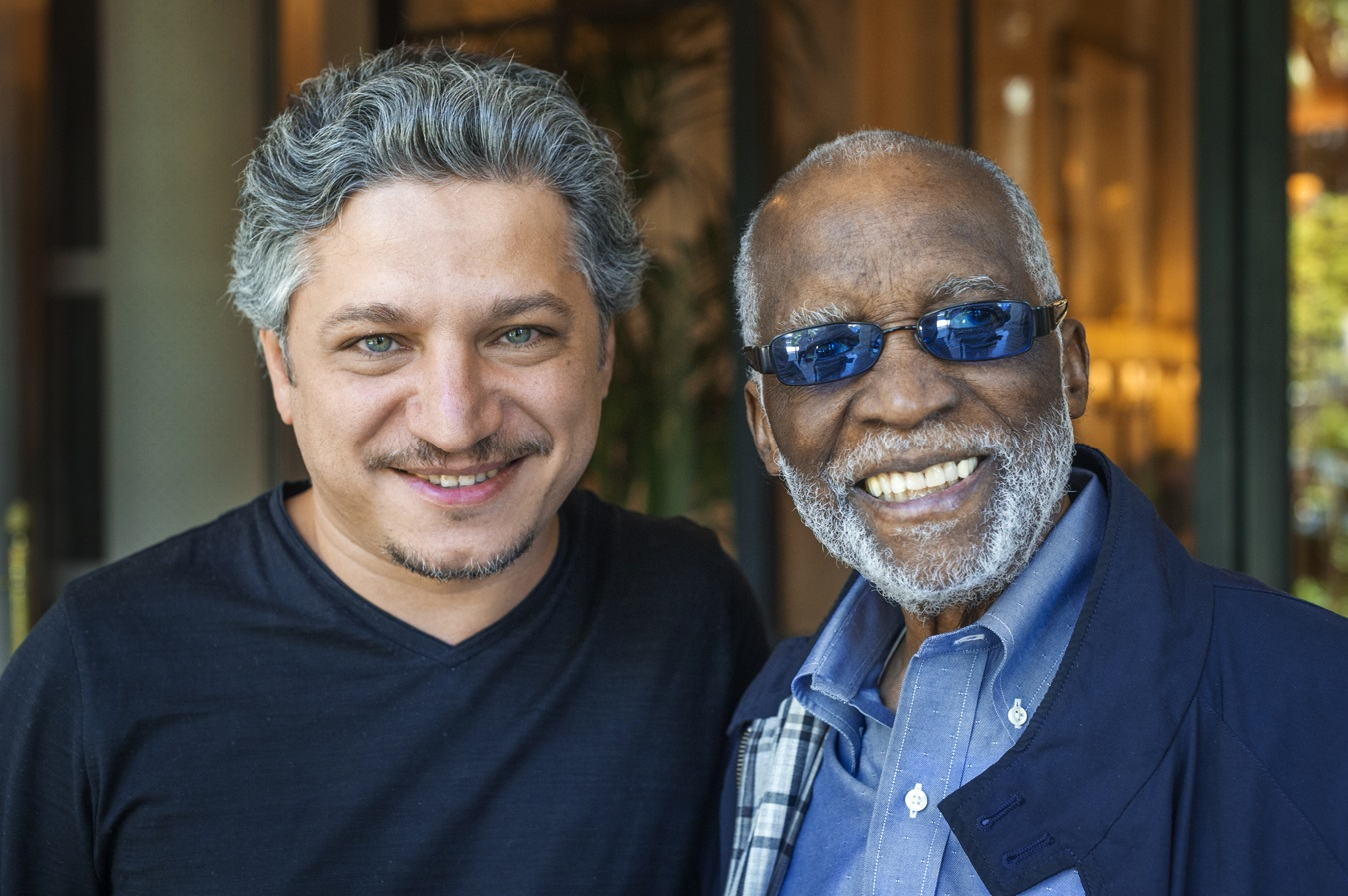 "Shahin Novrasli & Ahmad Jamal celebrate the releases of their respective albums". -Qobuz